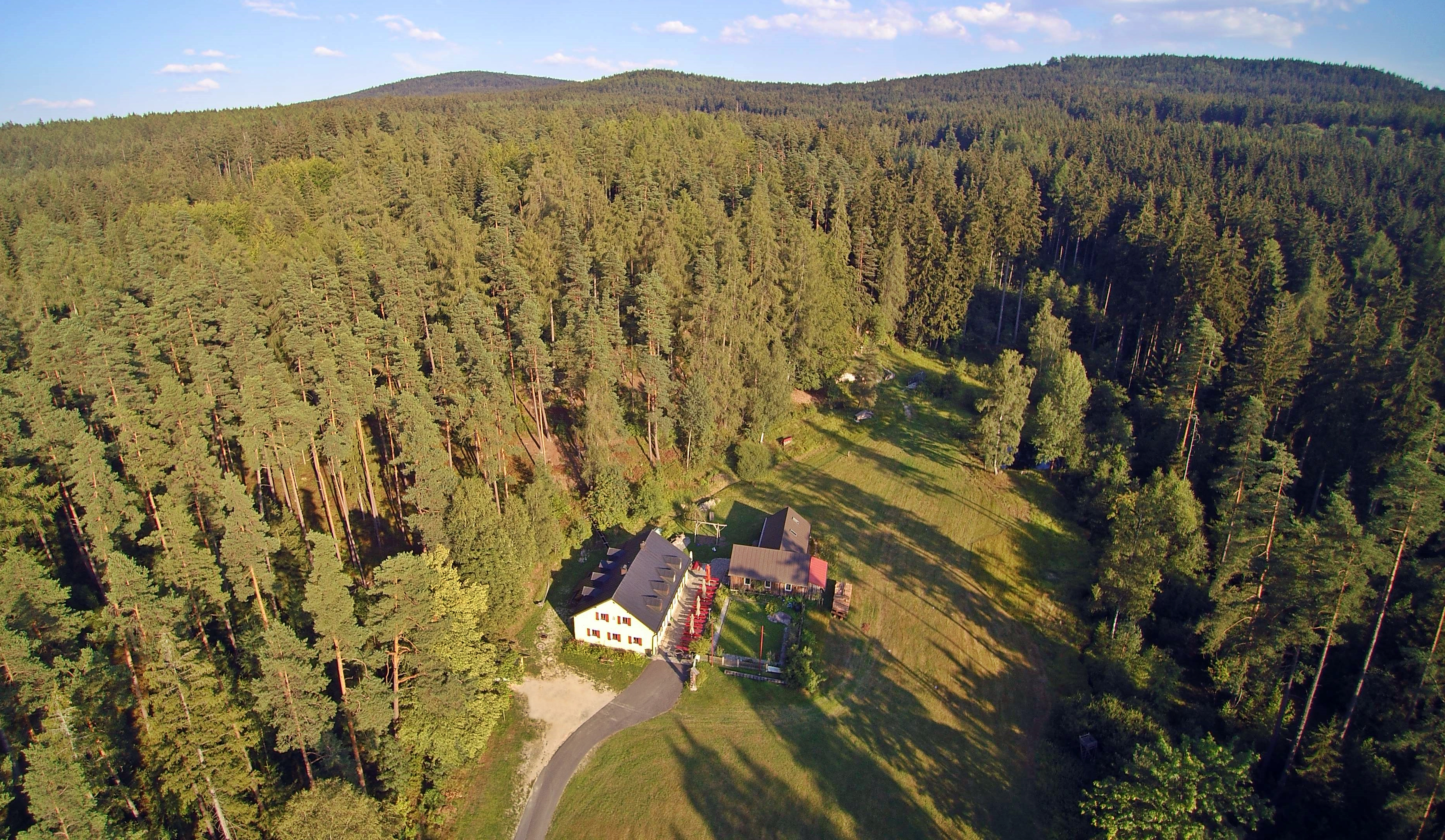 Die Glasschleif aus der Luft gesehen, im Hintergrund die höhen des Steinwaldes